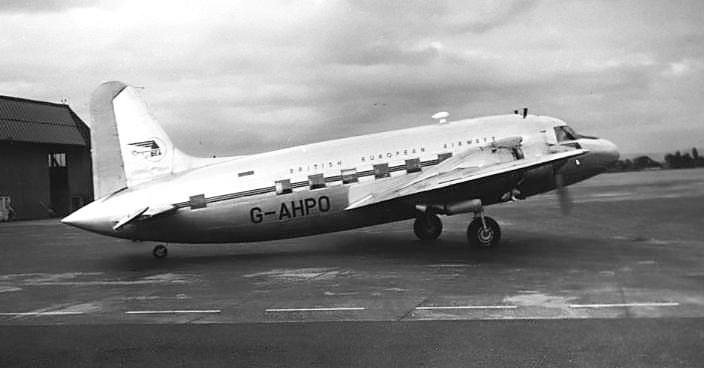 BEA Vickers Viking 1B G-AHPO "Venturer" at Manchester